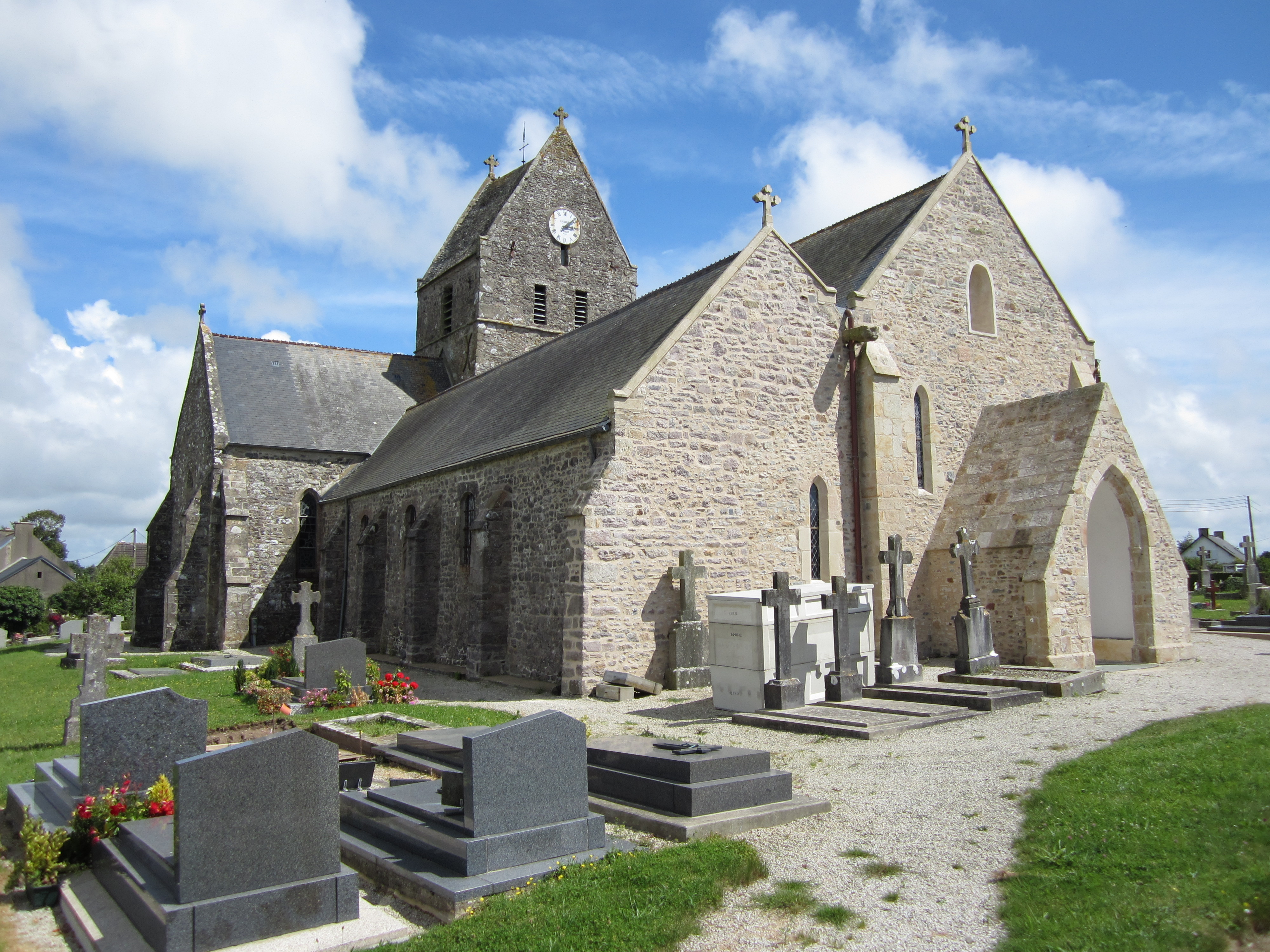 Église Saint-Germain-le-Gaillard (Manche) .